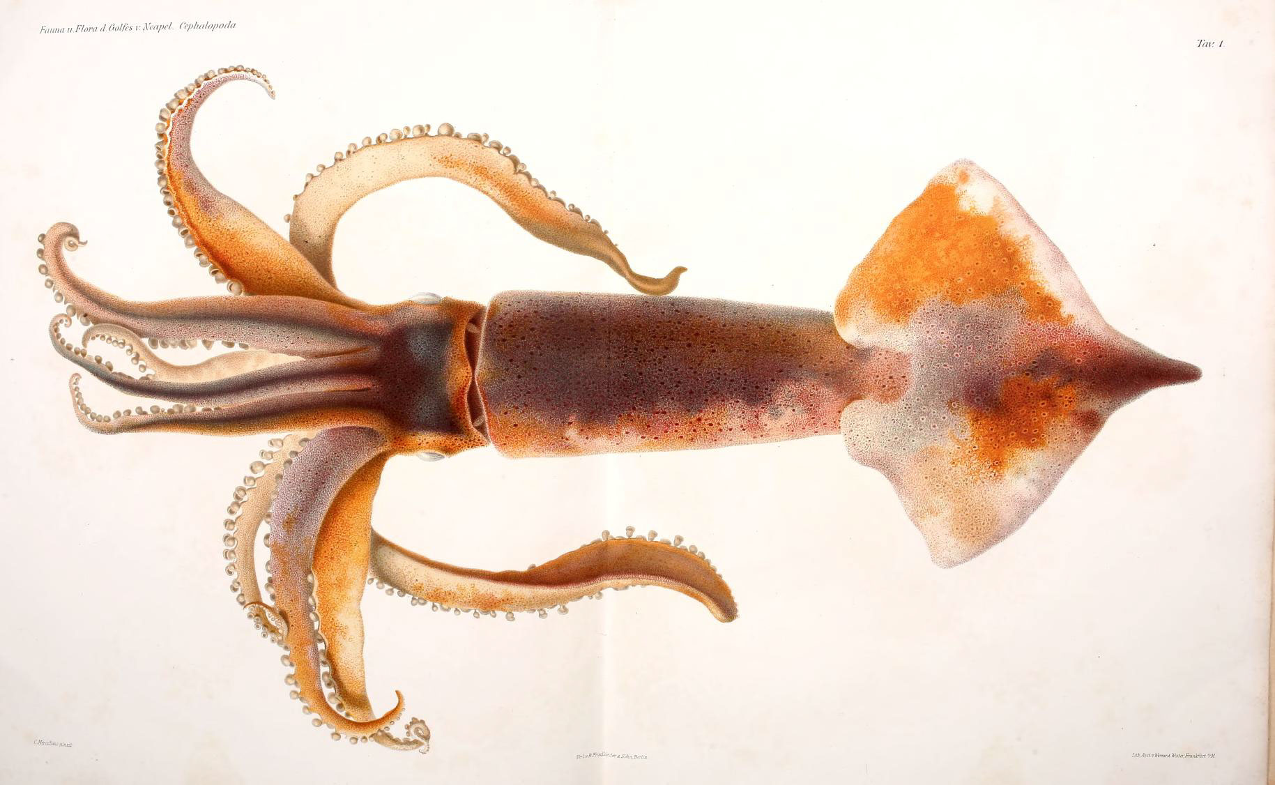 Giuseppe Jatta - I Cefalopodi viventi nel Golfo di Napoli (sistematica) Berlin :R. Friedländer & Sohn,1896.